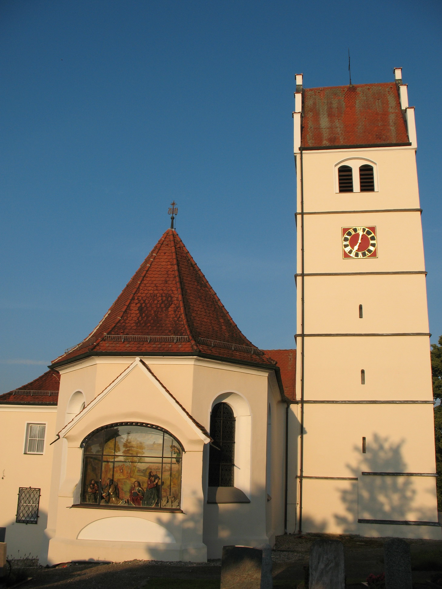 PFarrkirche St. Dionysius, Sulmingen, Gemeinde Maselheim: Ostende des Kirchenschiffs mit Ölbergszene